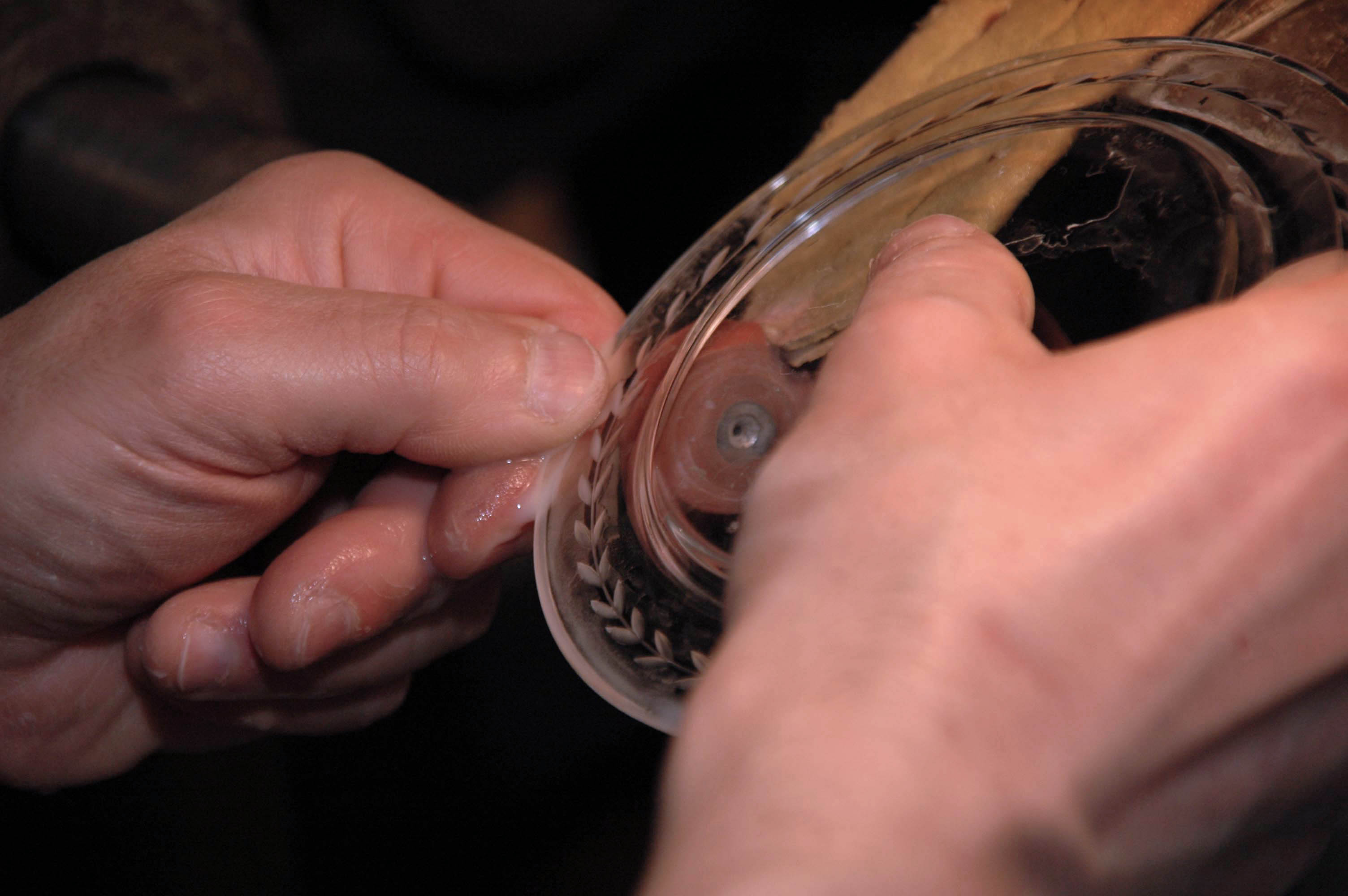 Foto scattata durante la mostra Artigianato e Palazzo a Firenze e rappresenta un artigiano della Moleria Locchi. Italia.